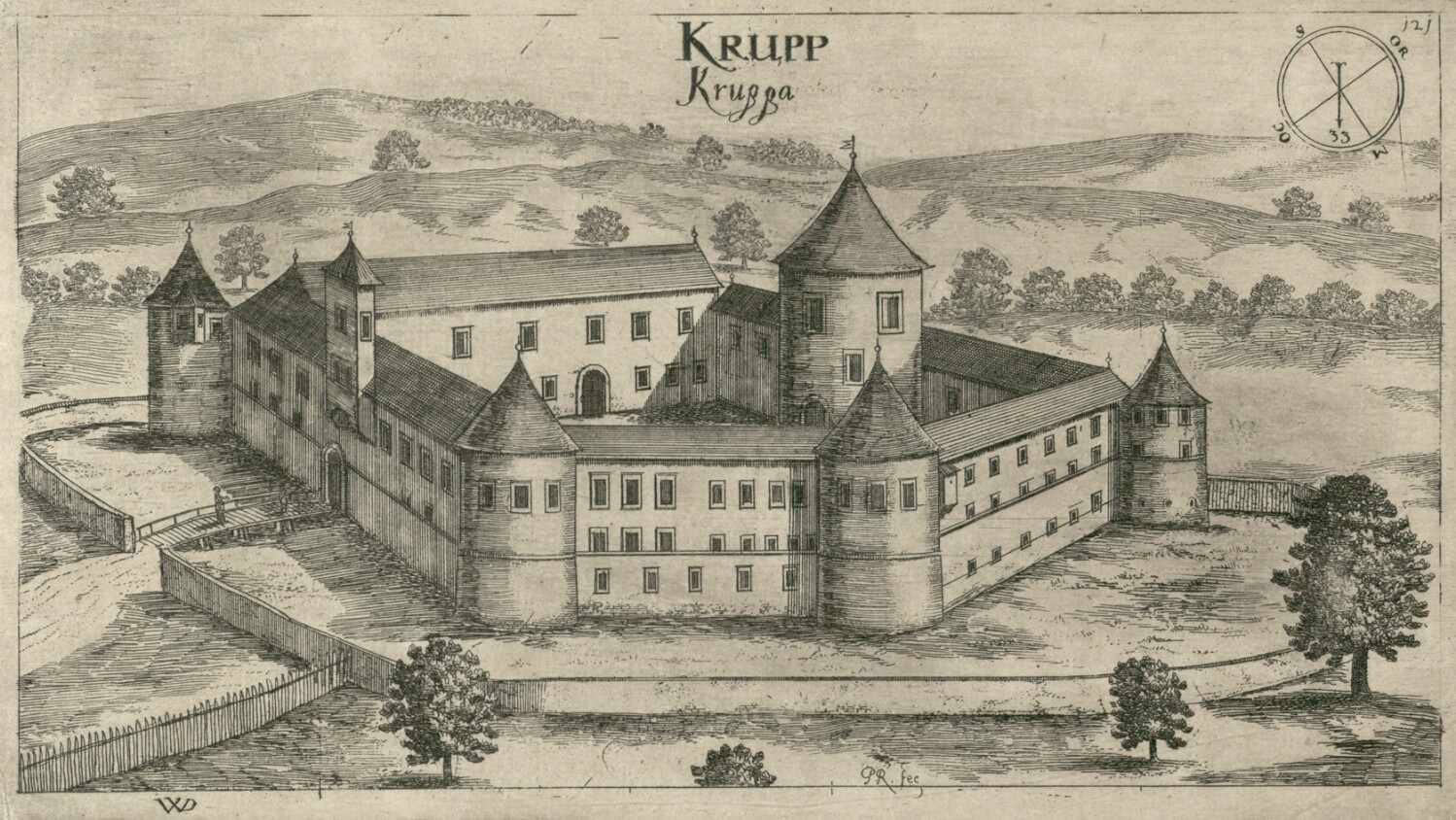 Grad Krupa